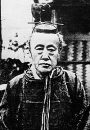 池田茂政（第13代岡山城主）、Ikeda Mochimasa(the 13th Okayama castellan)